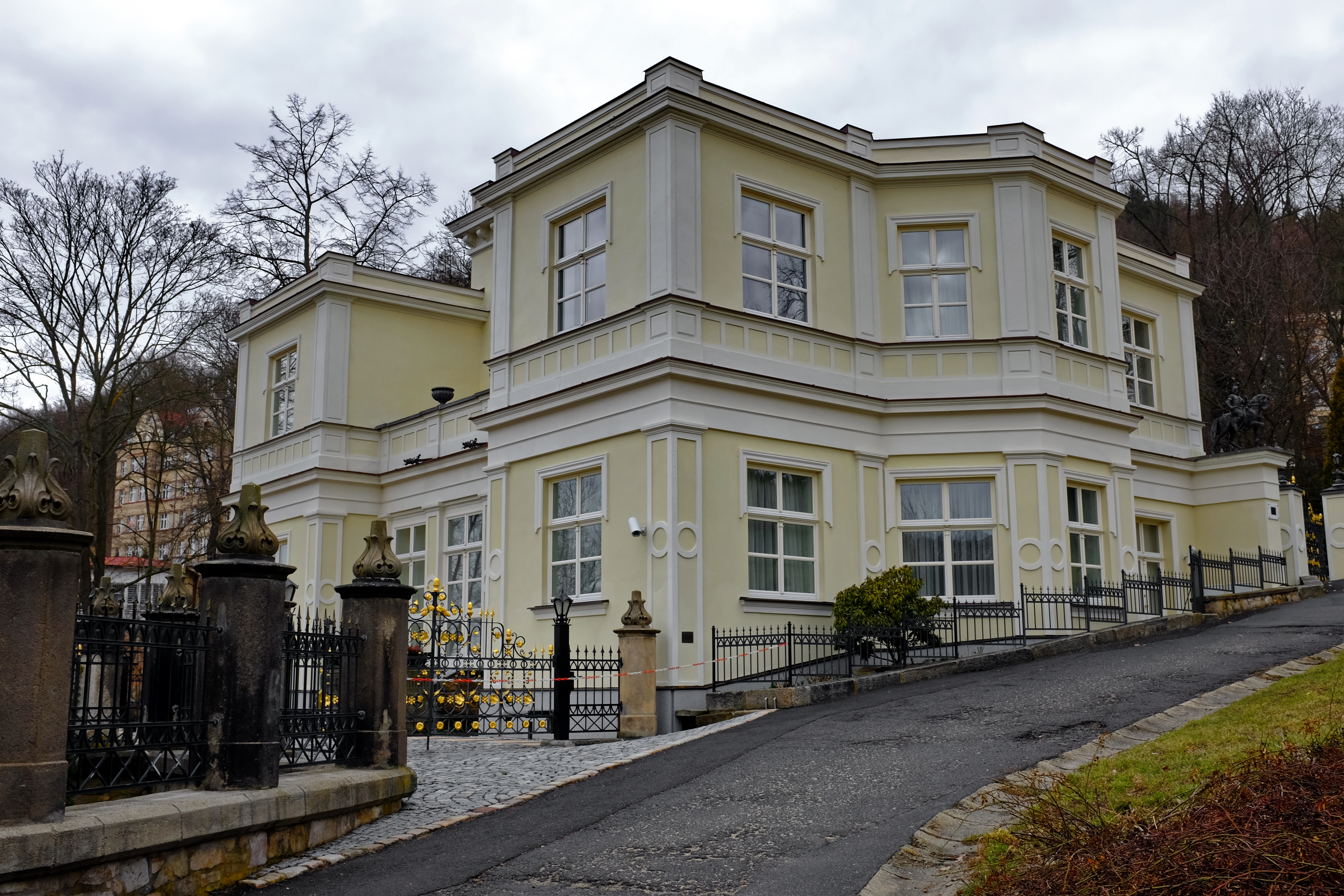 Lützowova vila, stezka Jeana De Carro 542/5, Karlovy Vary.